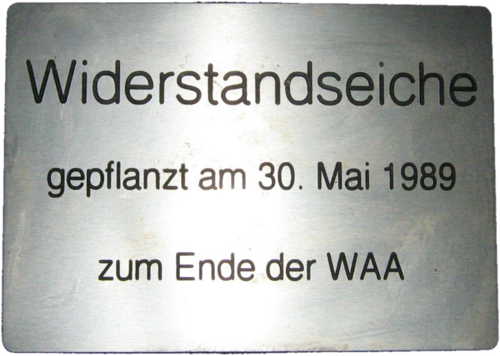 Gedenktafel unter der WAA-Widerstands-Eiche in Pfreimd (vgl. Wiederaufarbeitungsanlage Wackersdorf) Inschrift: "Widerstandseiche gepflanzt am 30. Mai 1989 zum Ende der WAA" Weblinks: Pfreimd: Fest zum 20-Jährigen - "Aus" der WAA: BN feiert mit prominenten Gästen - (Oberpfalznetz vom 18. Mai 2009) Gedenktafel bei der "Widerstandseiche" - Anti-WAA-Aktivisten erinnern an eine schwere Zeit - Der Ärger sitzt immer noch tief - (Oberpfalznetz vom 25. Mai 2009) „Wir haben mit friedlichen Mitteln Goliath bezwungen!“ - Eine Widerstands-Eiche kündet vom Kampf der Bevölkerung. Zum 20. Jahrestag des WAA-Endes wurde eine Gedenktafel dort enthüllt. - (Mittelbayerische Zeitung vom 25. Mai 2009)